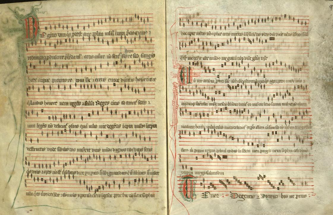 Biblioteca de Catalunya